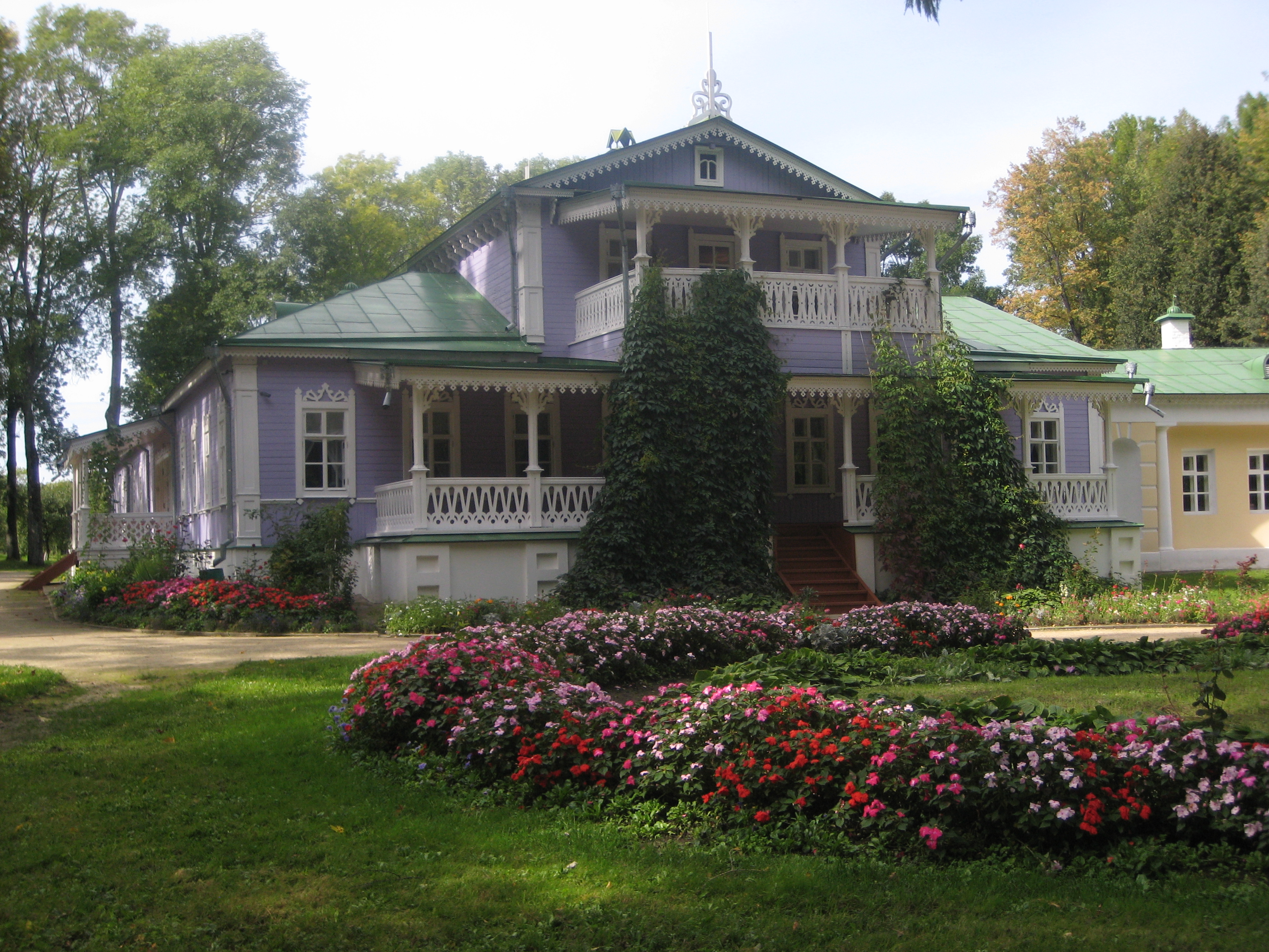 Главный дом (Орловская область, Мценск, село Спасское-Лутовиново)